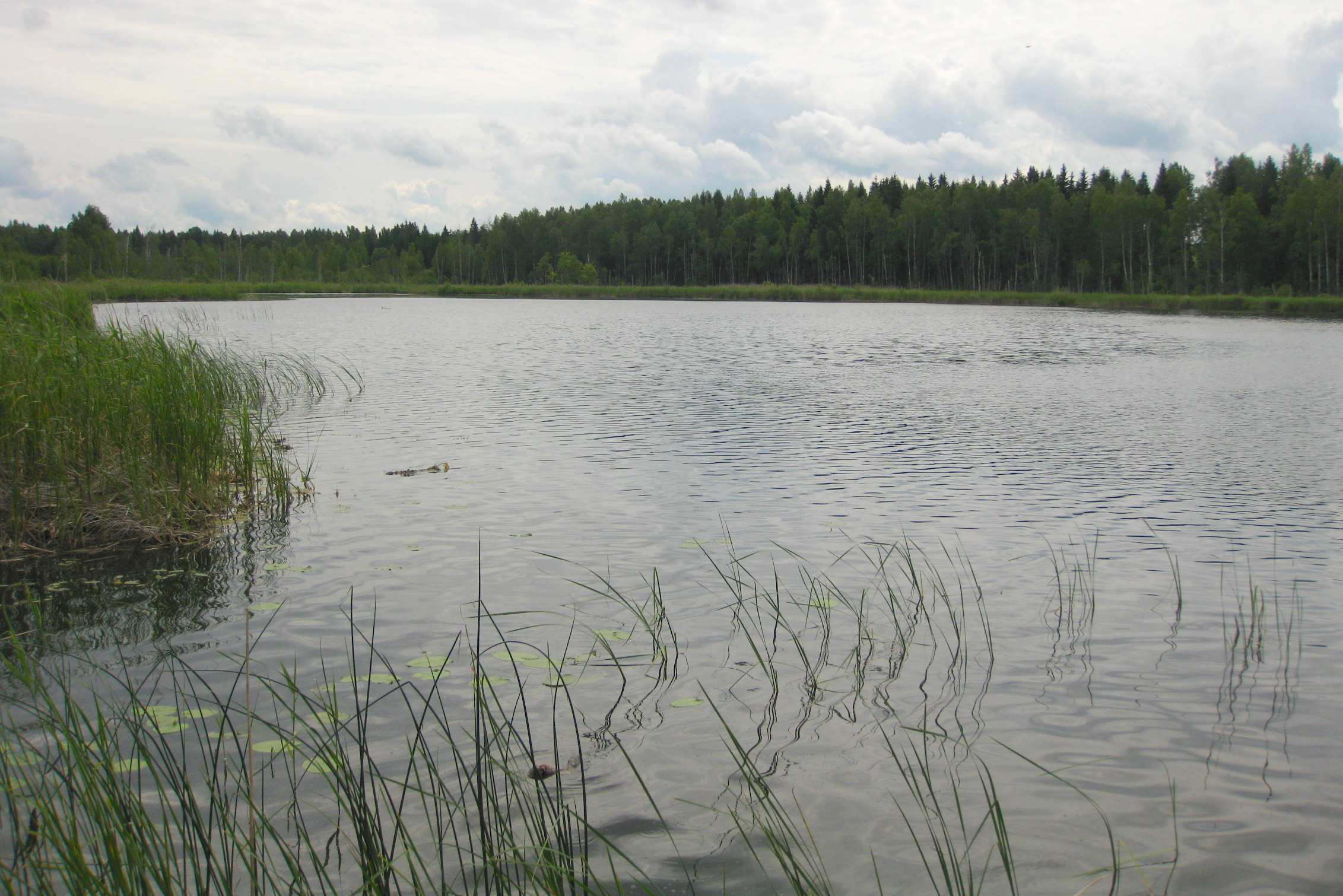 Prossa järve kagukaldal, Vooremaa MKA